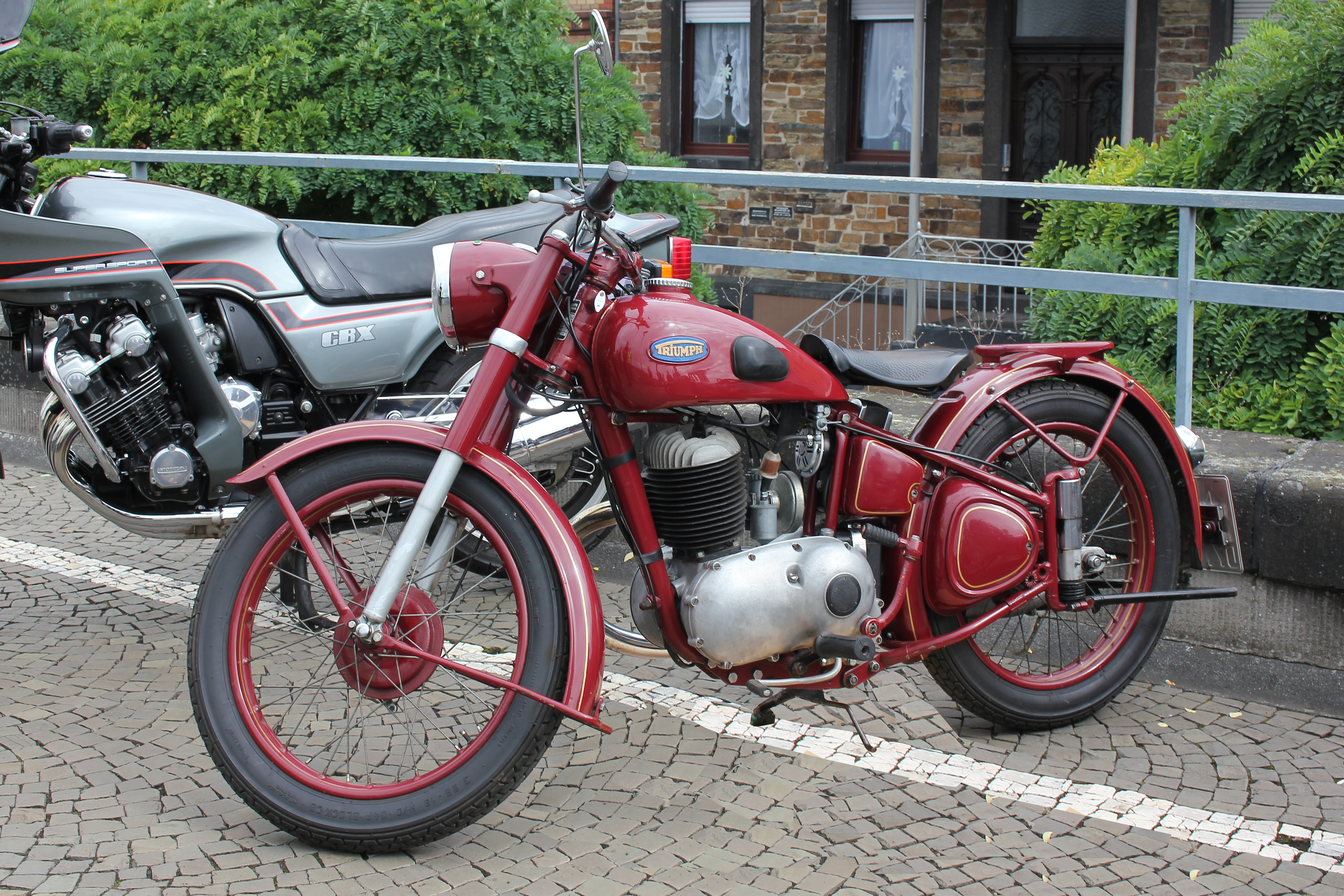 Triumph BDG 250 H, Bauzeit 1952 bis 1957, Zweitakt-Doppelkolbenmotor, 248 cm³, 11 PS bei 3800/min, Vierganggetriebe mit Fußschaltung, Teleskopgabel und Geradeweghinterradfederung, Höchstgeschwindigkeit 95 km/h; Preis 1952 in Schwarz 1.795,00 DM, in Rot 1895,00 DM. Das Modell im Bild ist nicht gut restauriert, das heißt, die Verchromung der Gabel und des Tanks wurden gespart.